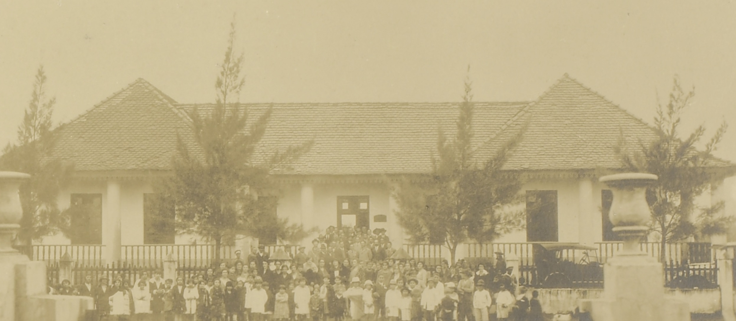 Imagem do Fundo Ministério da Guerra, do Arquivo Nacional